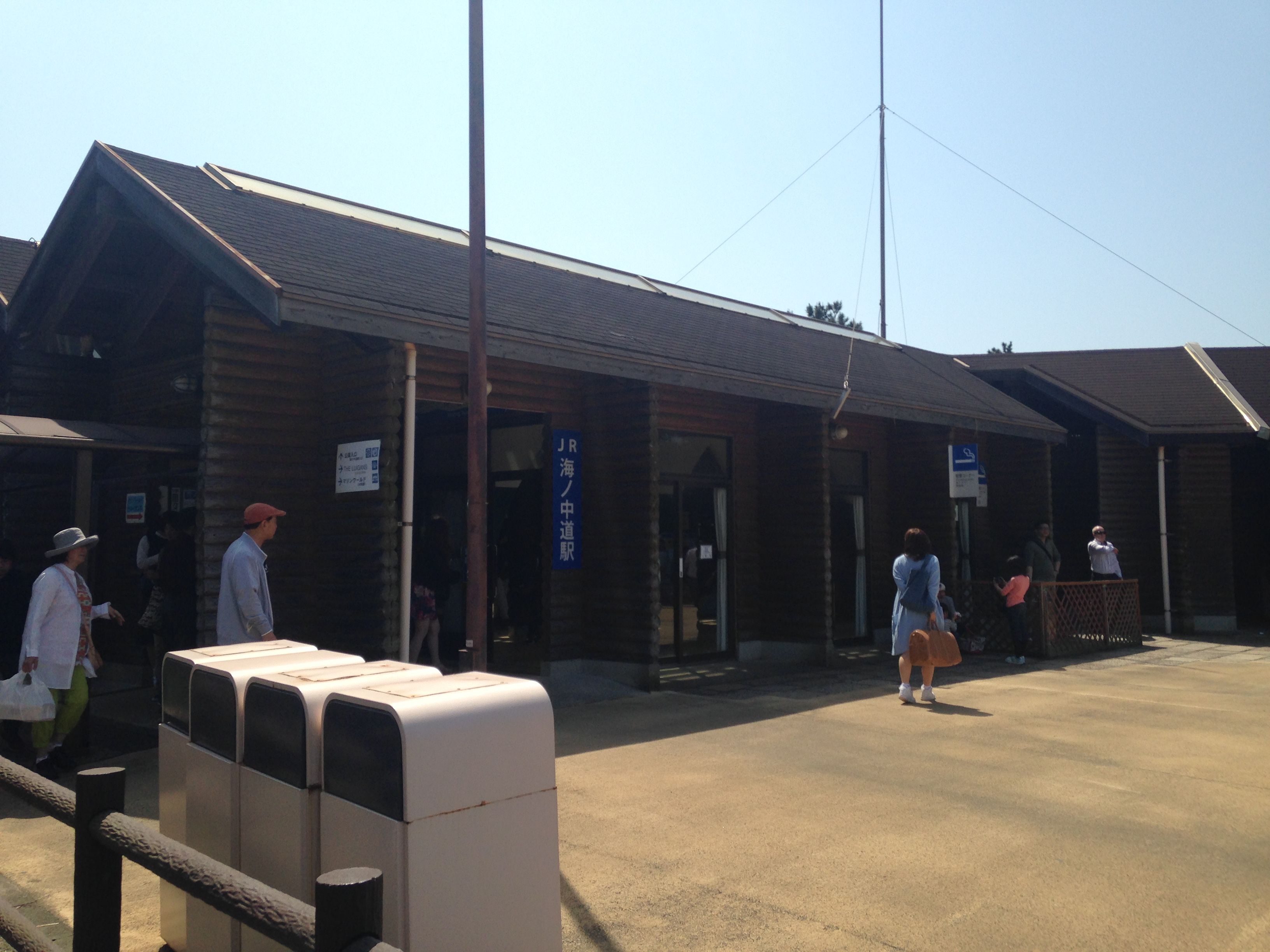 ホームより望む海ノ中道駅駅舎